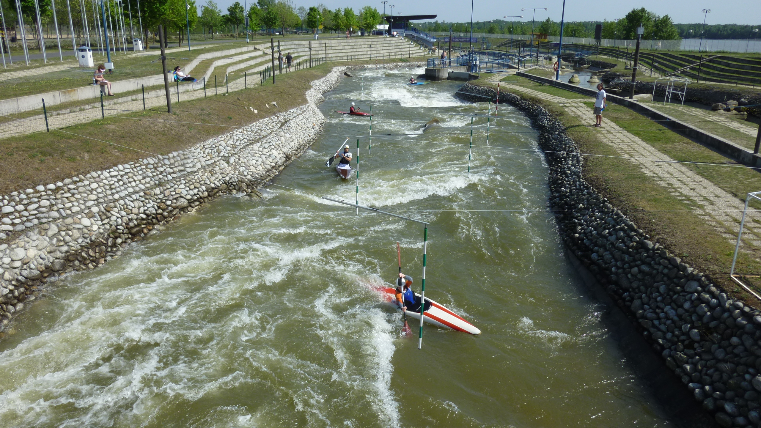 DIVOKÁ VODA SMEROM DOLE